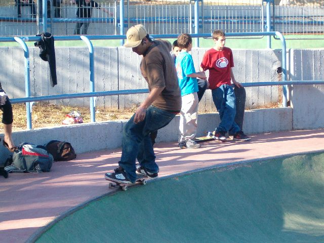 בועז אקינו בגן סאקר בירושלים.